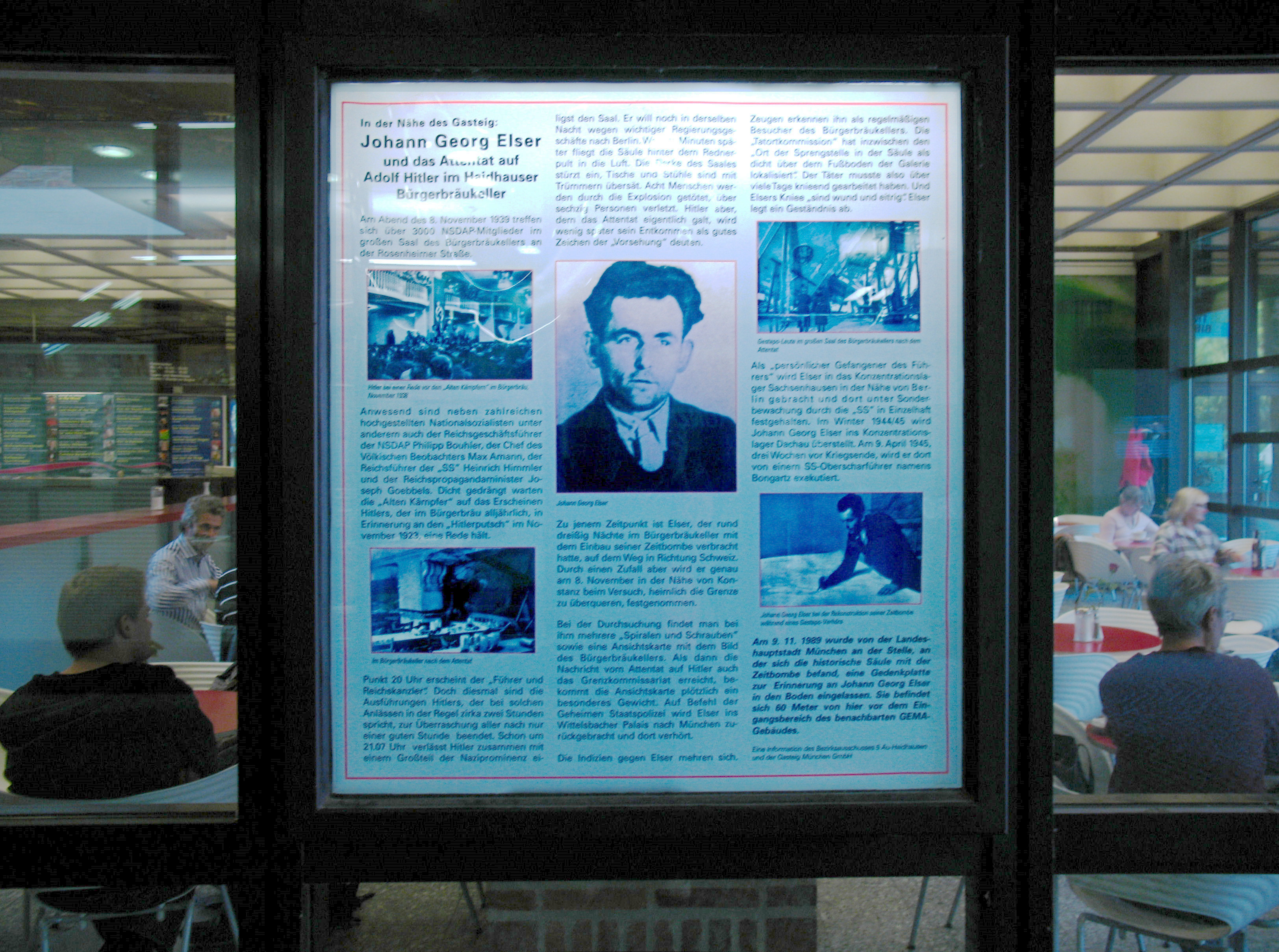 Georg Elser, beleuchtete Infotafel, München im Gasteig